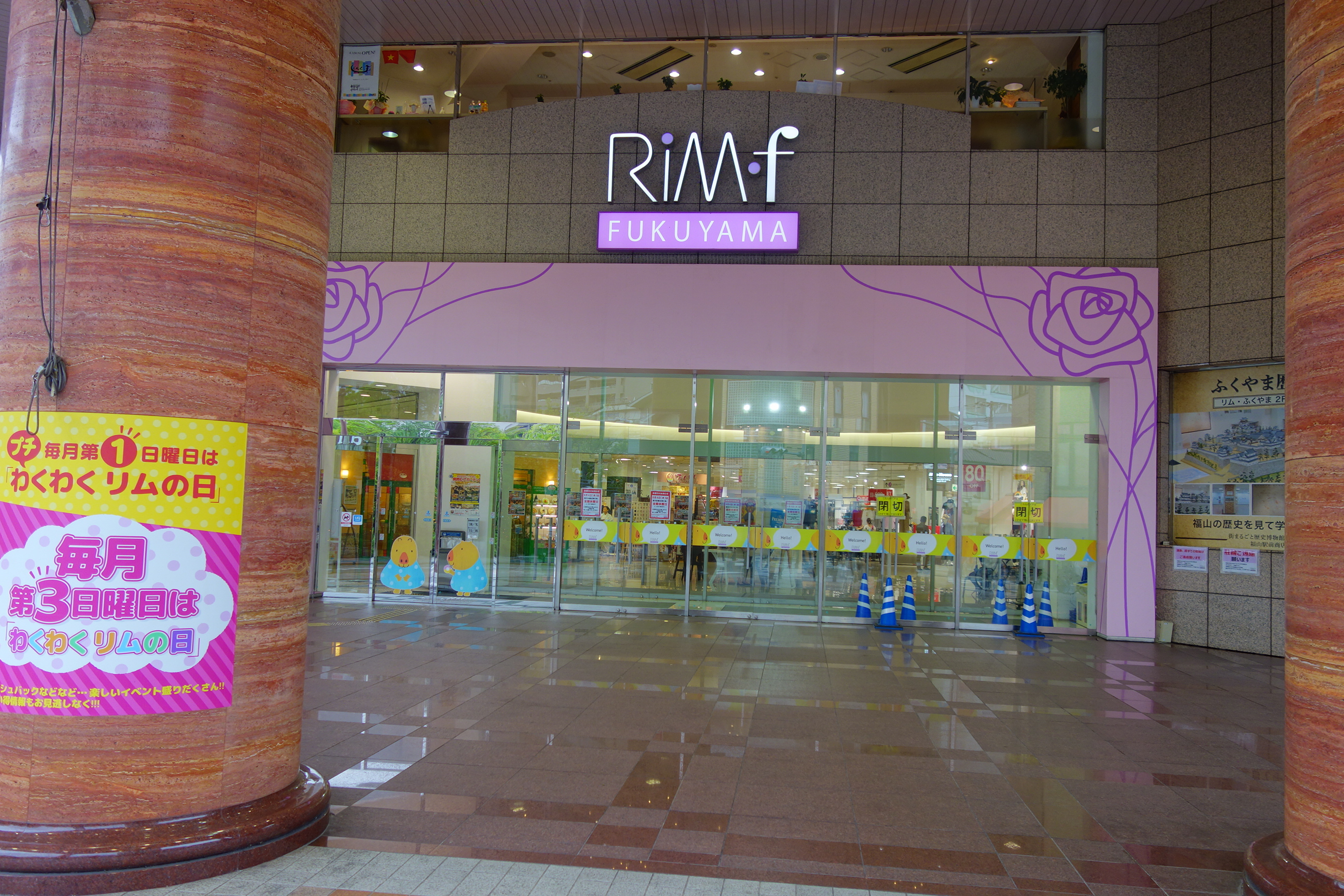 広島県福山市のRiM-fの入口